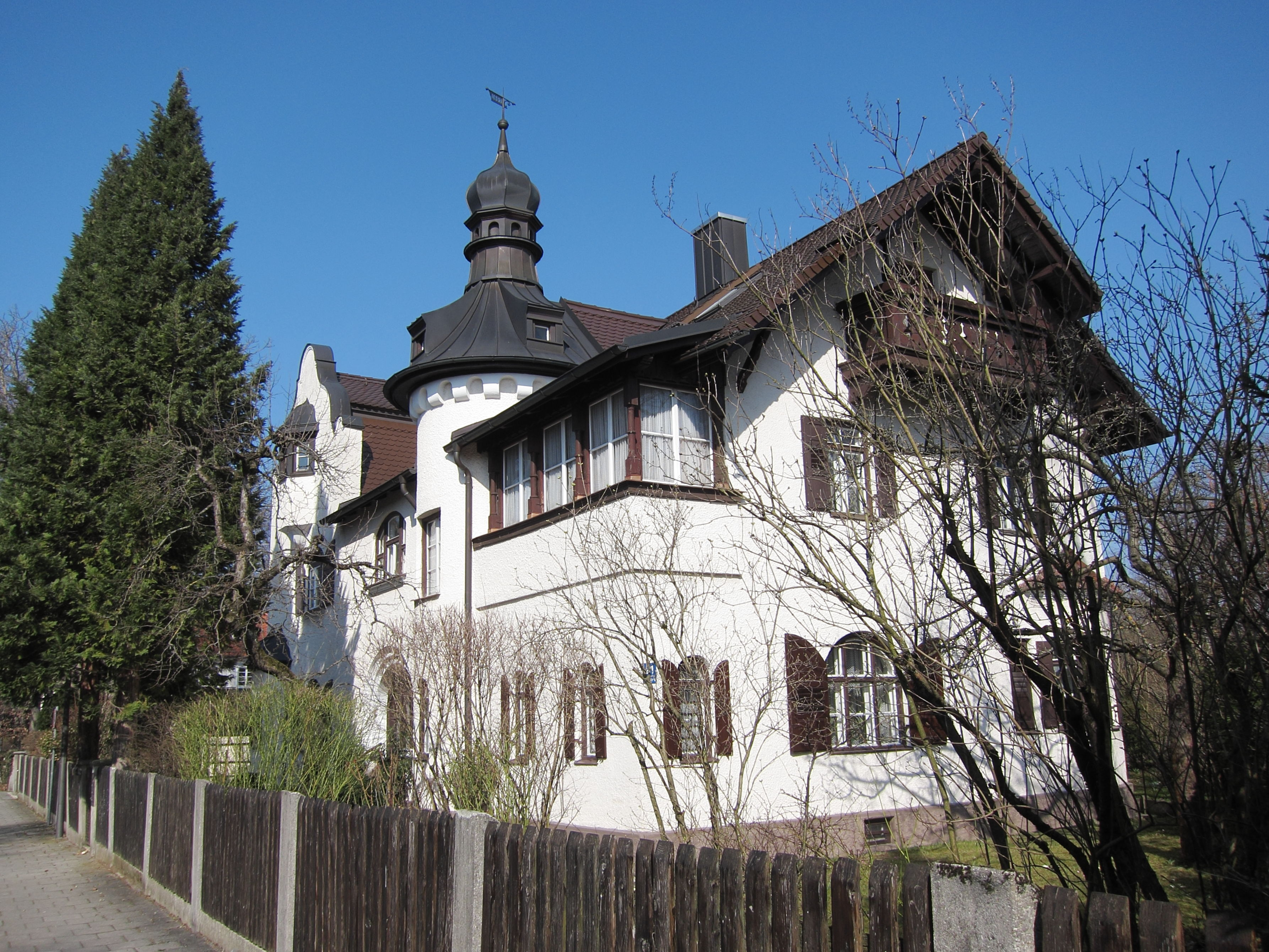 August-Exter-Straße 21; Malerische Villa in Ecklage, Türme, Erker, 1897 aus dem Büro August Exter.